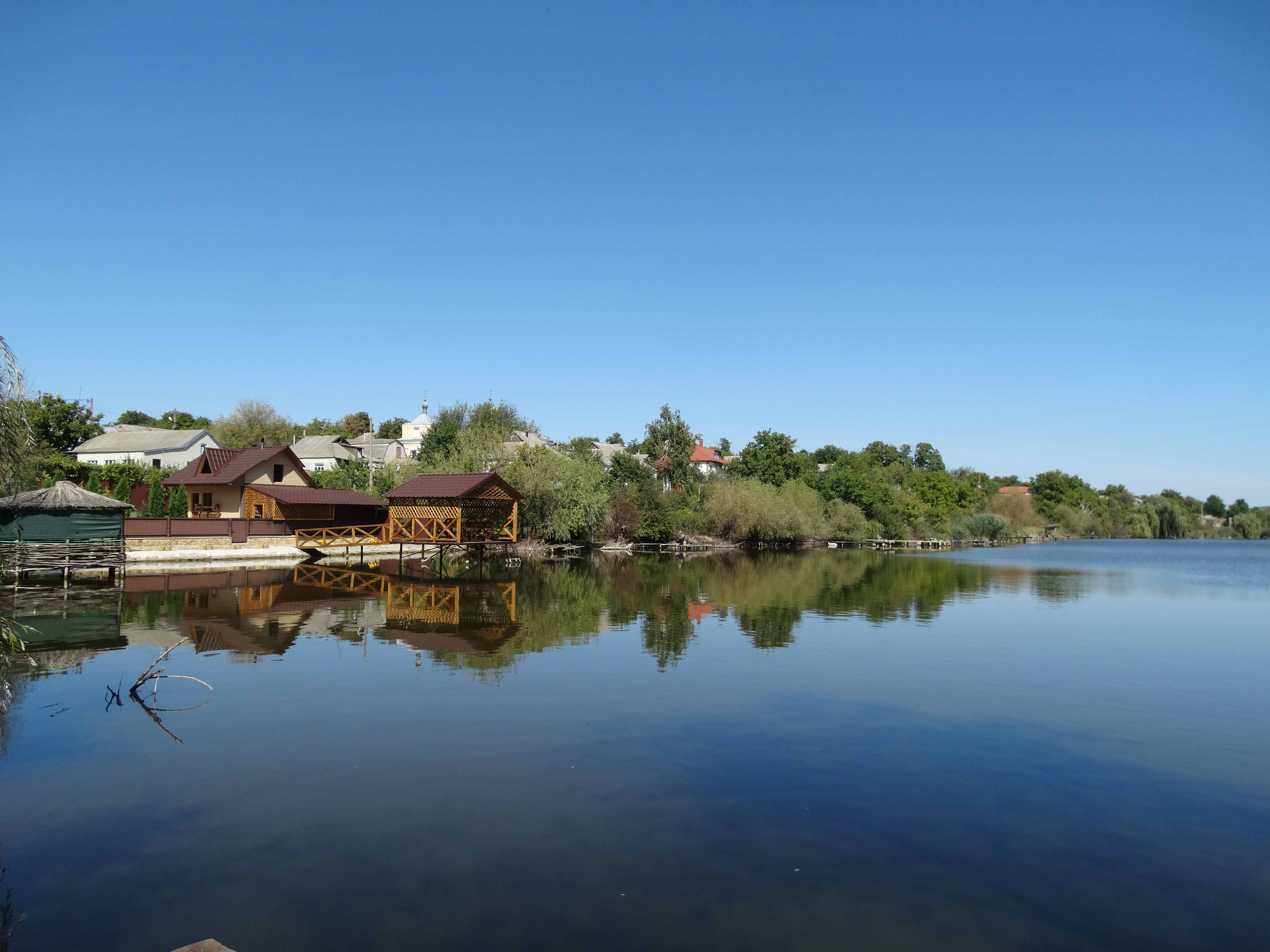 Окнянське водосховище на річці Ягорлик; смт Окни, Одеська область. Вікіекспедиція на північ Одещини